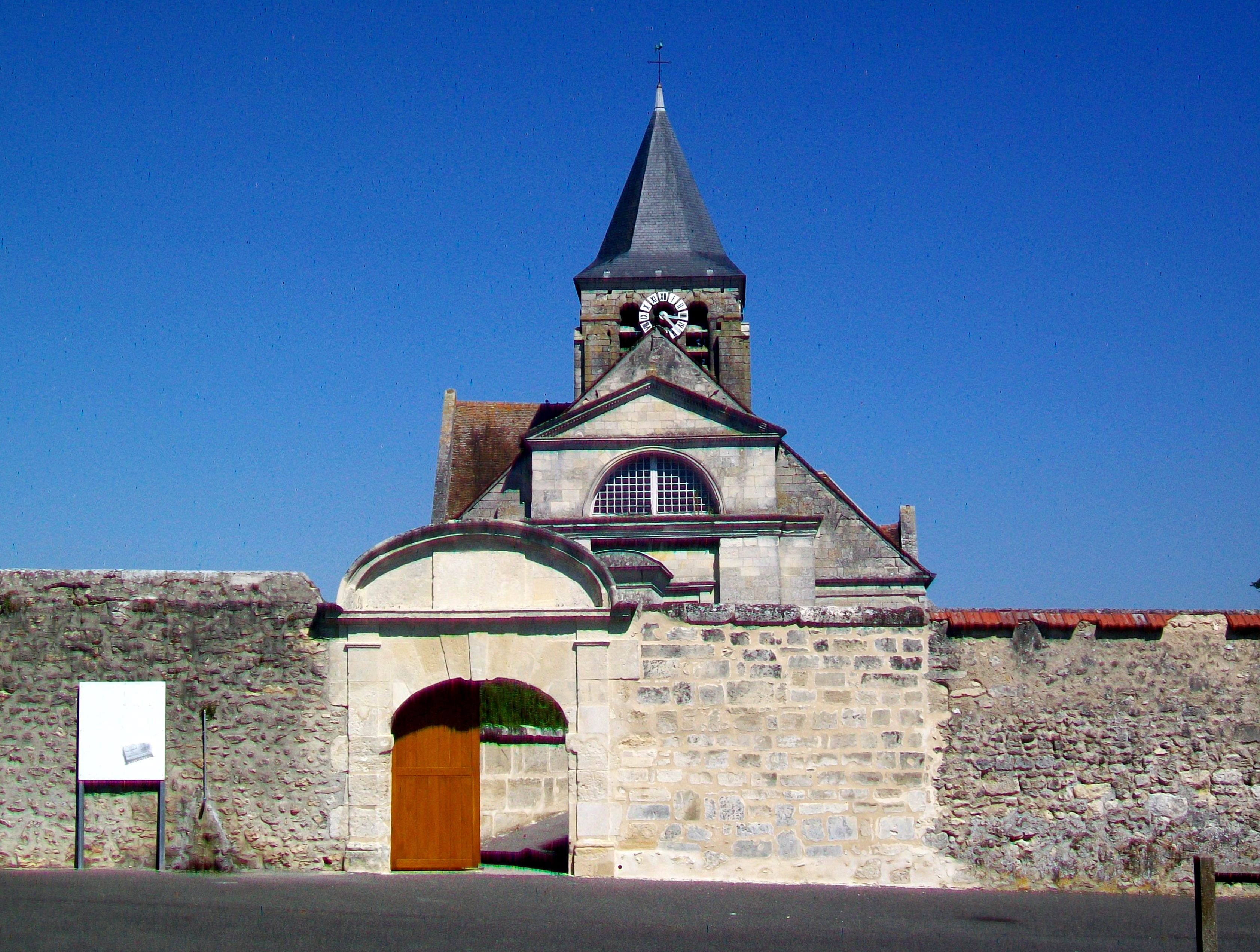 Le mur de cimetière ; en arrière-plan, l'église.